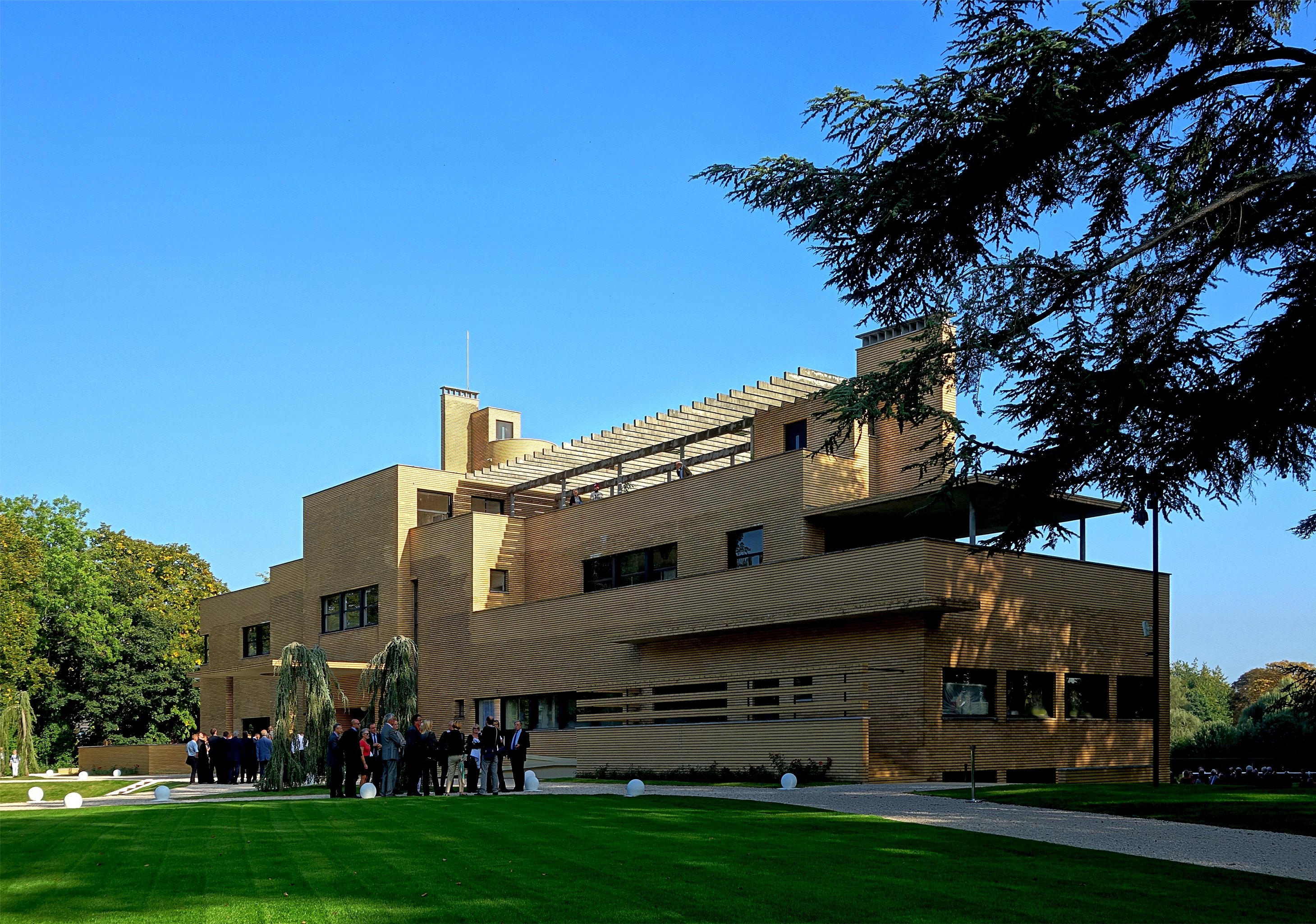 Villa Cavrois (Classé) à Croix, Nord. .